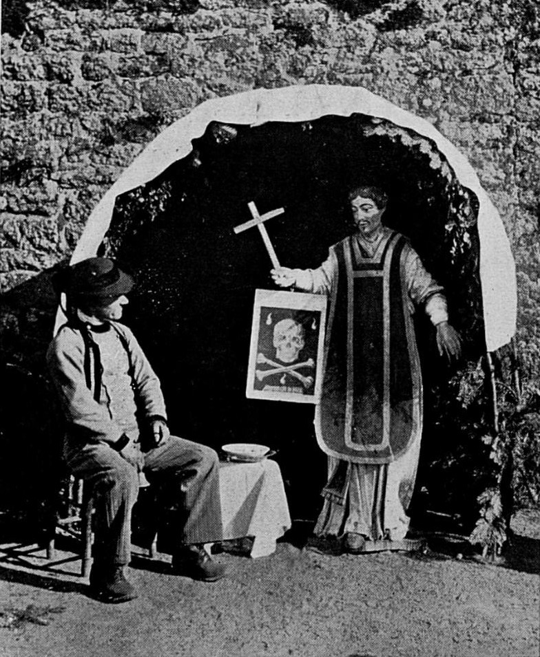 Locronan, grande Troménie, reposoir avec statue en l'honneur des trépassés (photo de 1903 probablement)